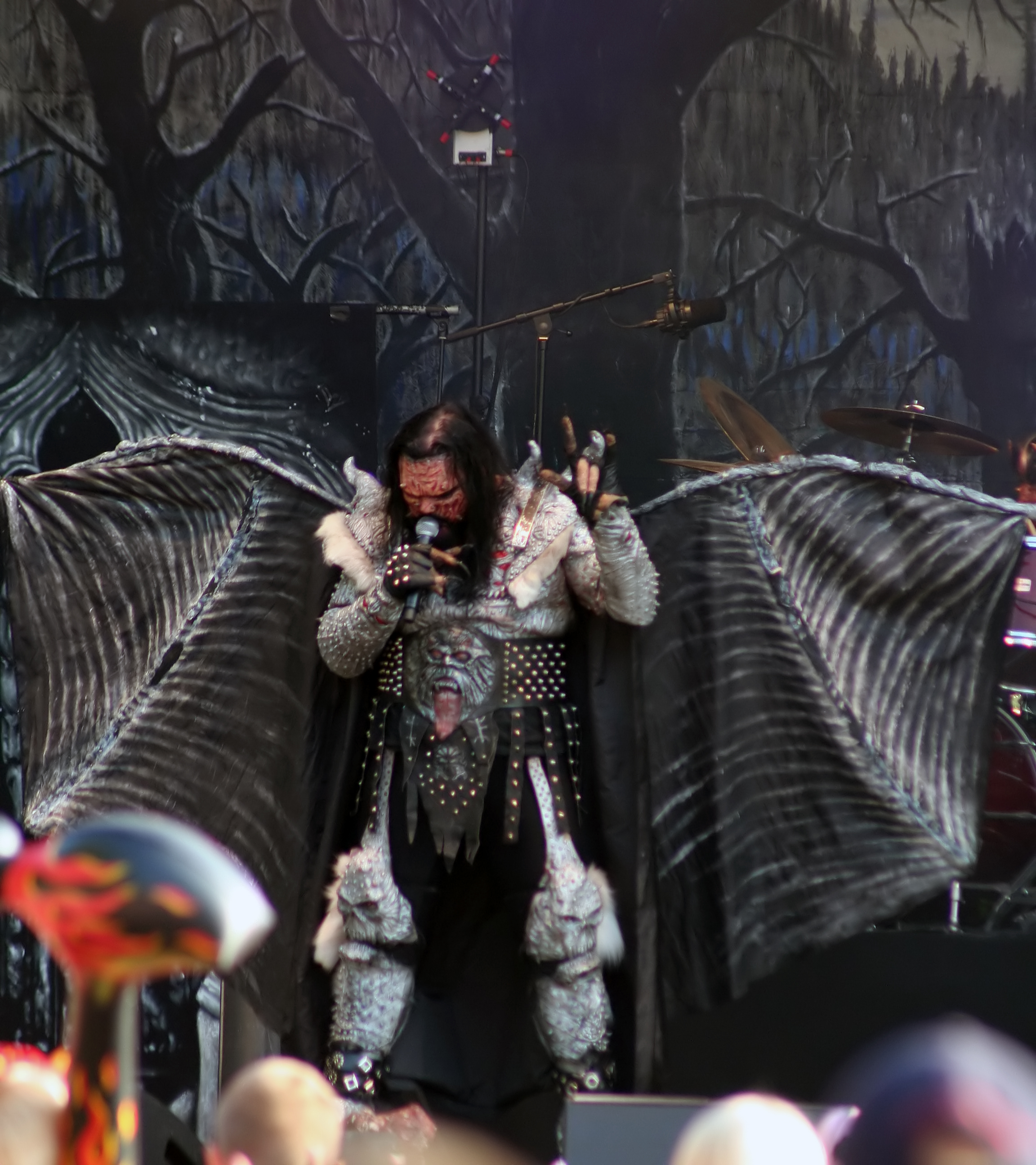 Lordi